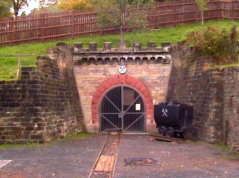 Eingang zum Rischbachstollen, Besucherbergwerk Rischbachstollen in St. Ingbert